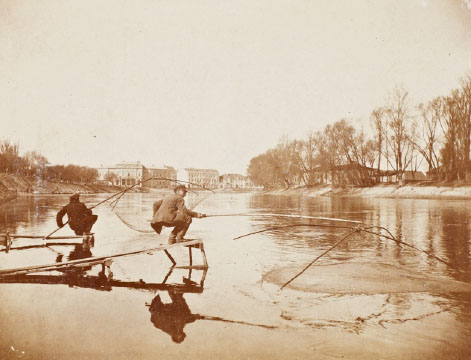 Rybacy łowiący podrywkami ryby nad Wilią, Wilno, przełom XIX i XX w., fotografia czarno-biała, brom tonowany